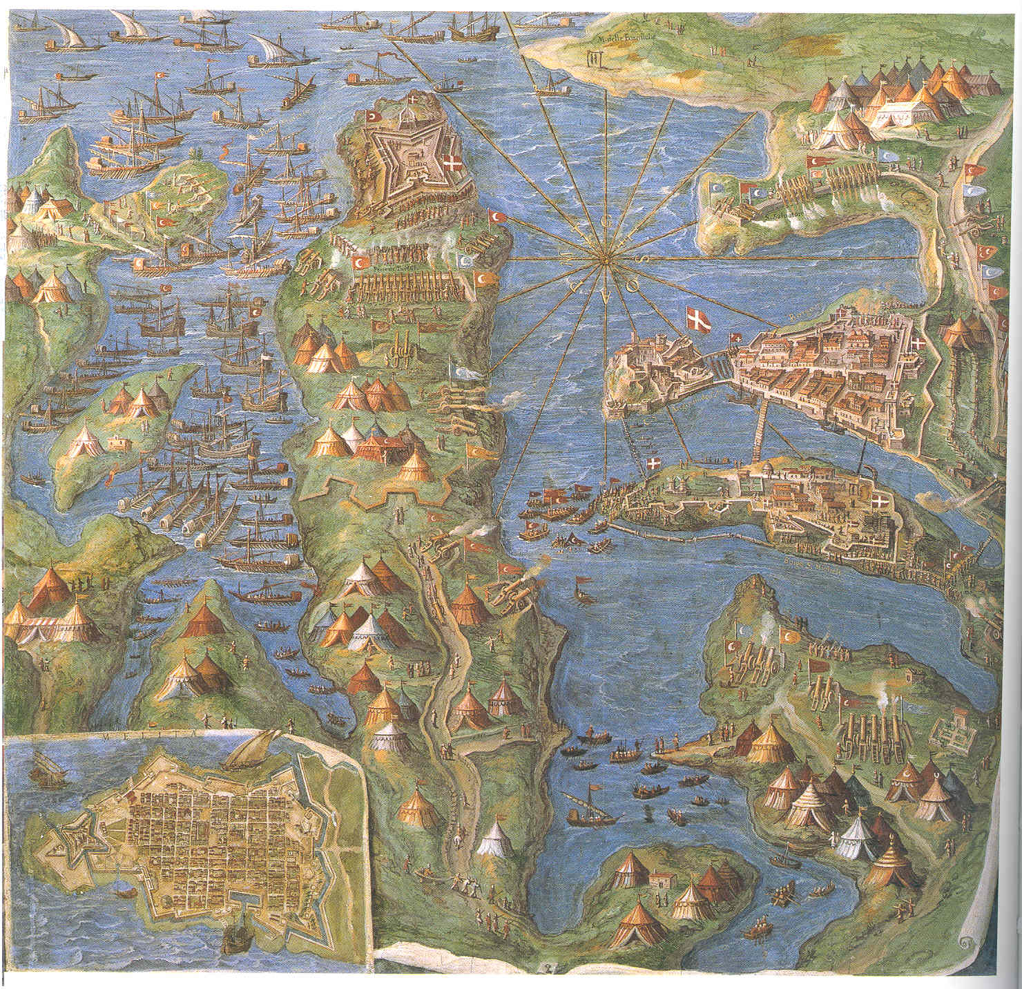 El Setge de Malta- Al final de la península que forma el Mont Sceberras, ocupat per l'artilleria turca, es troba el fort de San Elm, on encara resisteixen els Cavallers de Malta. A l'altre costat del Gran Port es pot veure Birgu i San Angel, rodejat des de tots els punts excepte per Senglea i San Miquel, la que l'uneix un pontó i que també és fortament atacada des de Sceberras, a part de pel mar, on una palissada marítima la protegeix de la flota turca, que plena de geníssers, el 15 de Juliol, es va enfonsar pels trets rebuts des de San Àngel. A sota a l'esquerra, es mostra un pla de La Valetta -allà anomenada Melita, Malta en llatí- coronada per San Elm.